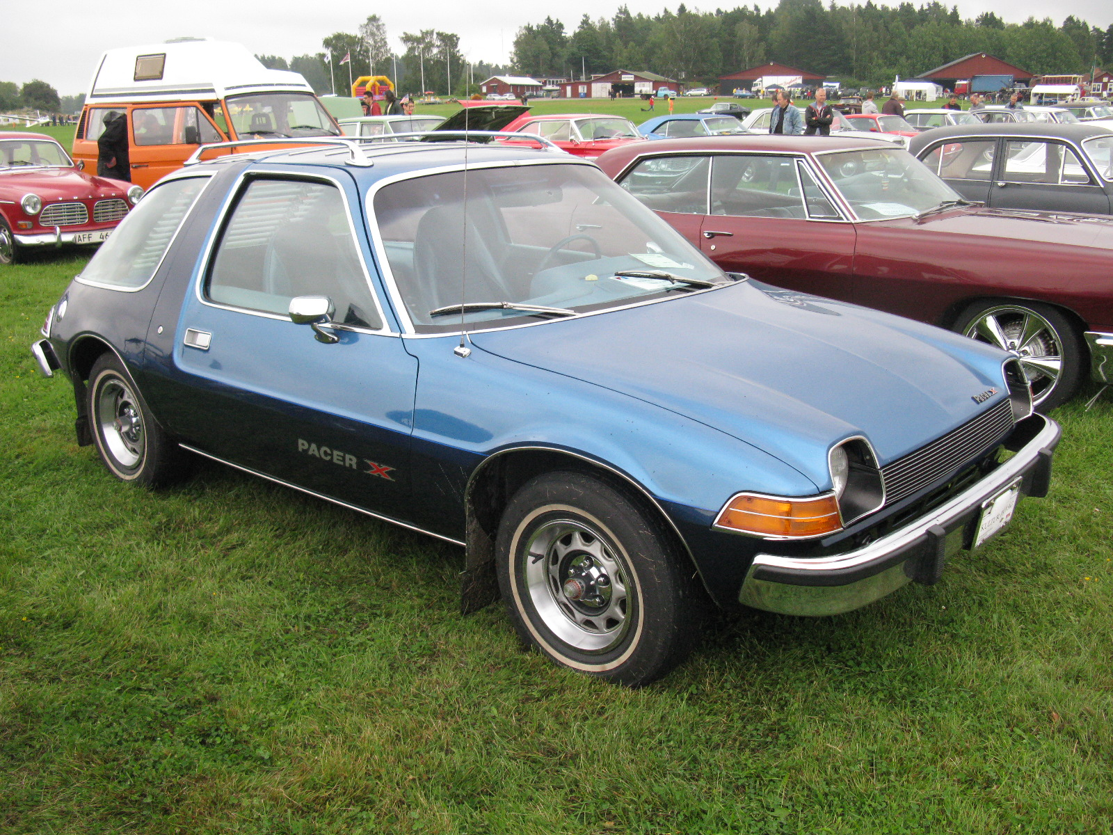 AMC Pacer X